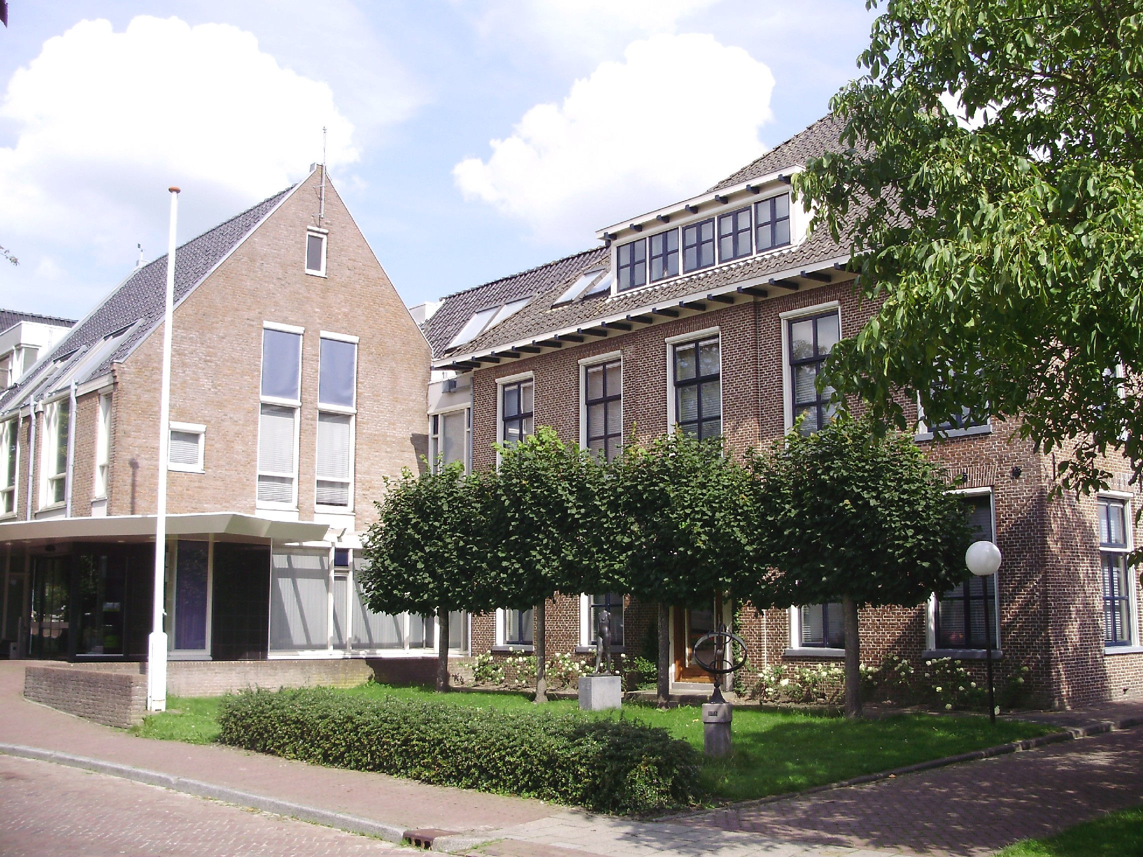 Gemeentehuis van Littenseradeel in Wommels (provincie Friesland, Nederland)